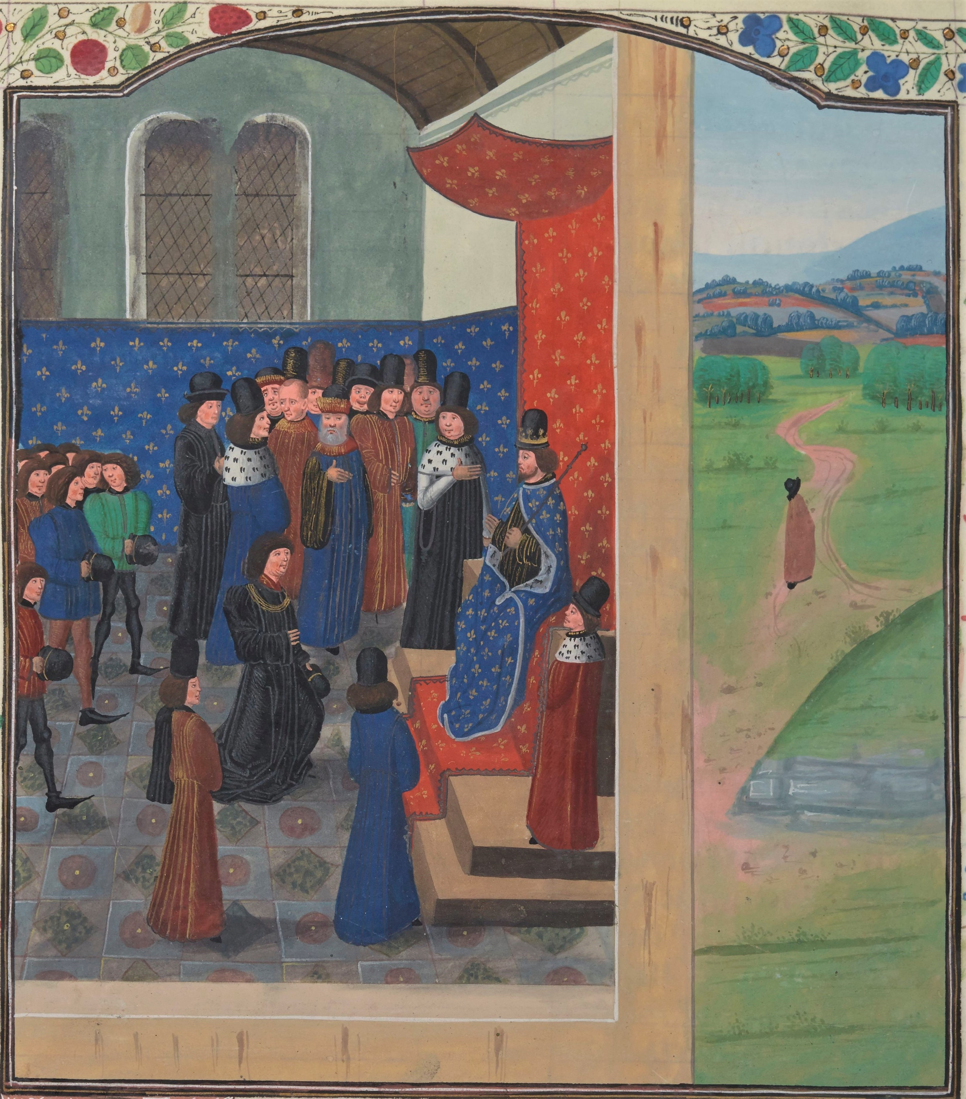 Philippe VI de Valois et Jean de Montfort, Jean de Wavrin, Chroniques d'Angleterre, Flandre, XVe siècle. Marque de possession postérieure, France, XVIe siècle.